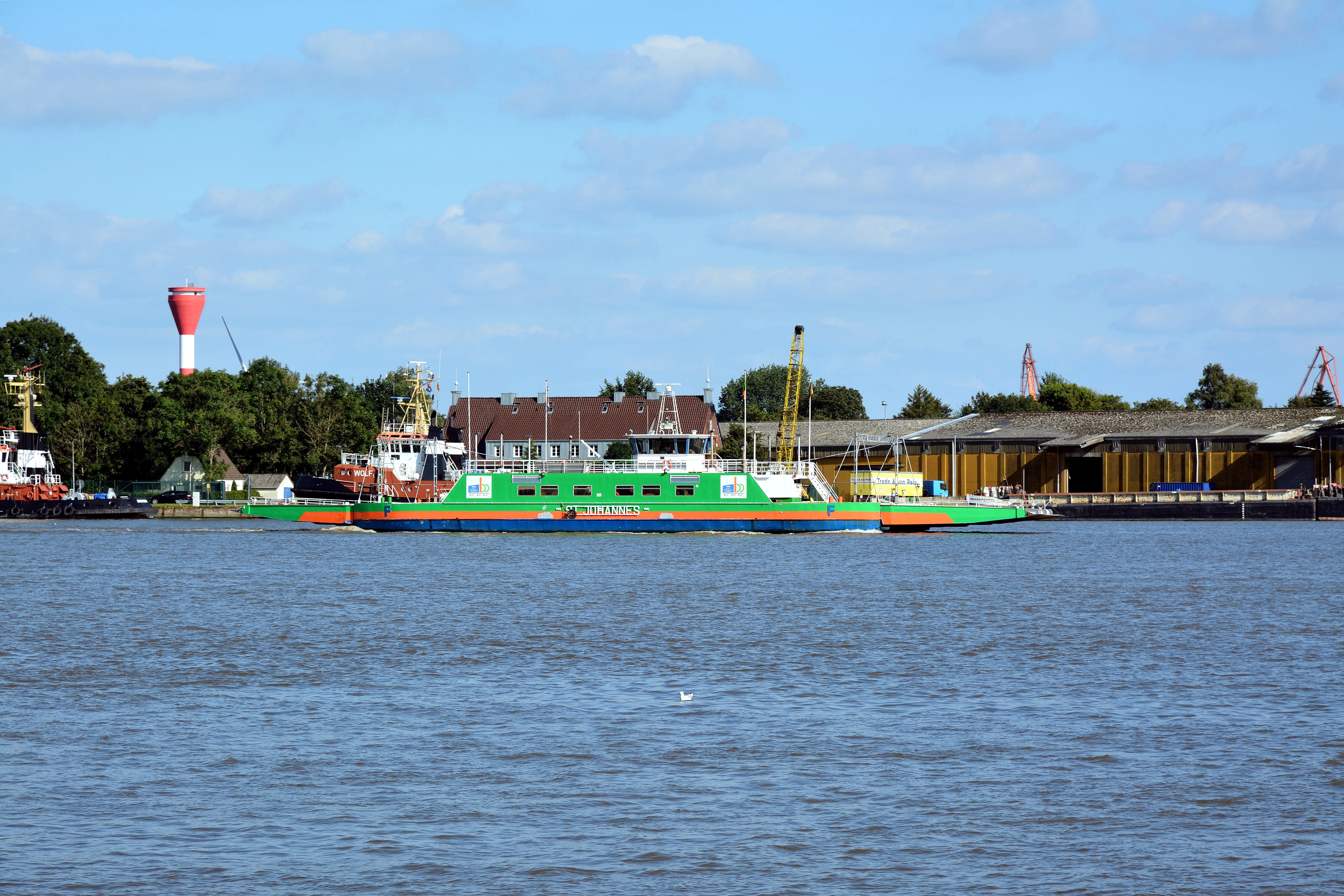 Die ehemalige Rheinfähre "St. Johannes" ist jetzt ein Arbeitsschiff beim Bau der dritten Schleuse in Brunsbüttel.